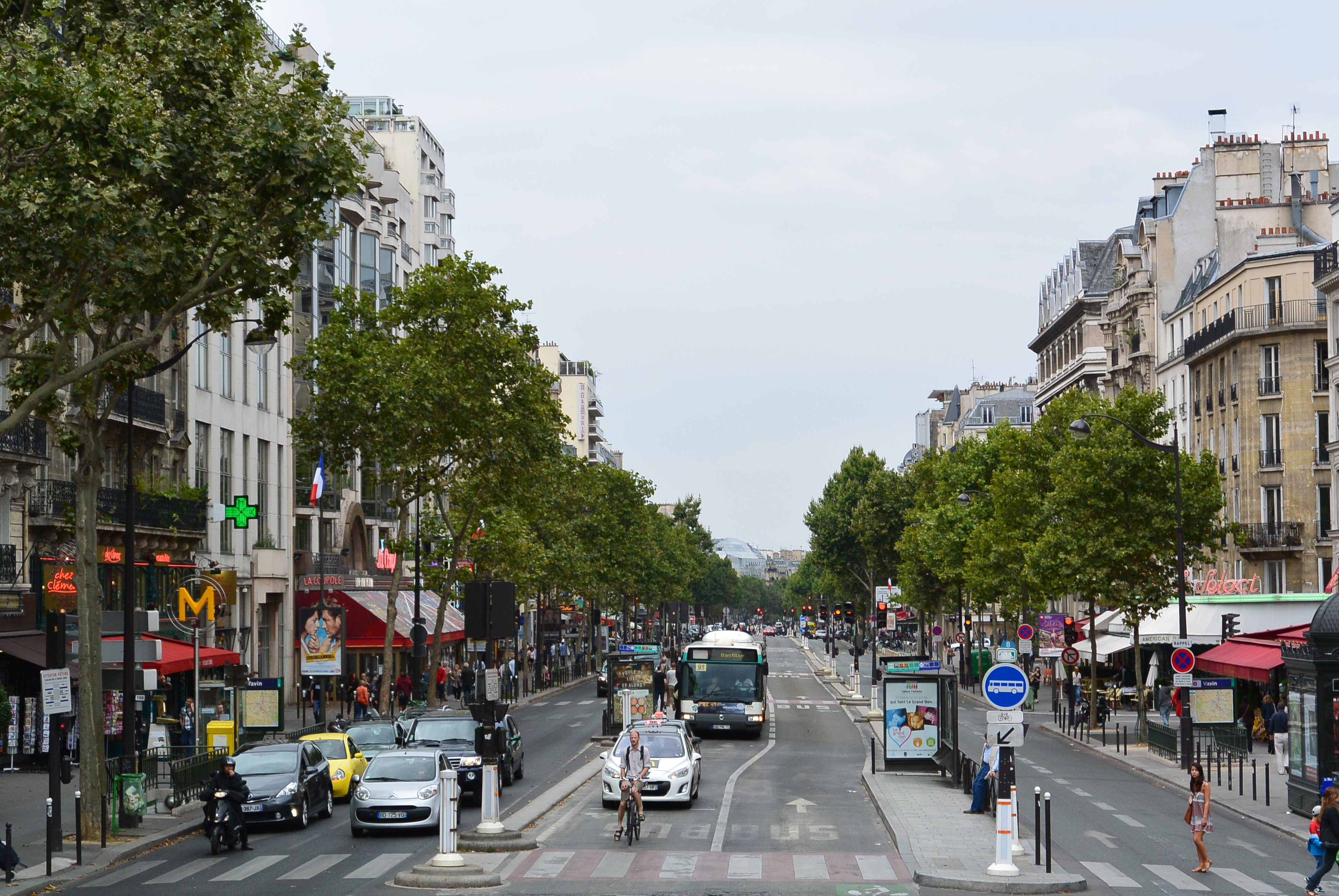 Boulevard du Montparnasse, Paris.